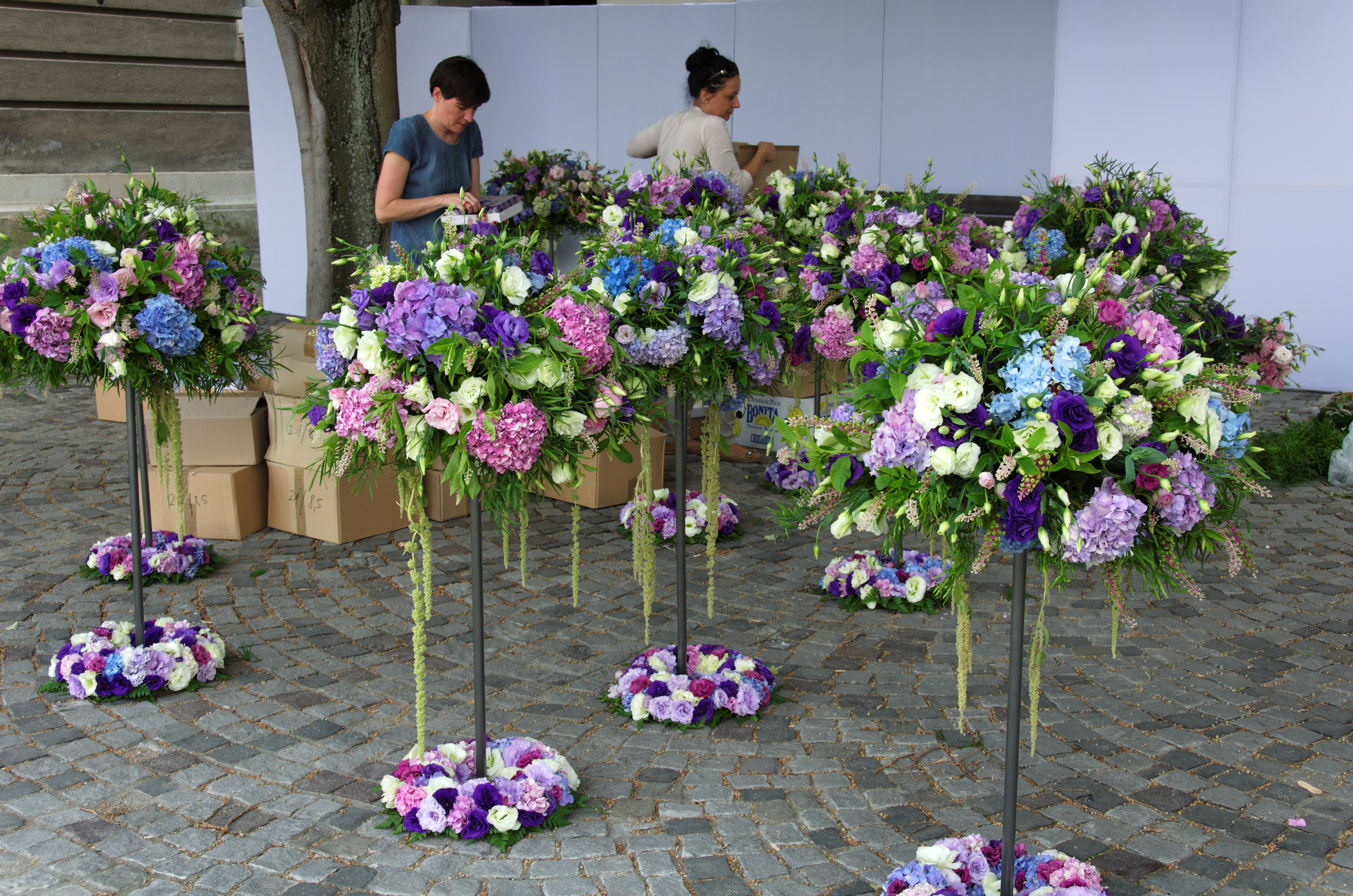 Compositions florales destinées à des tables de mariage. Terrasse de la galerie nationale hongroise, Budapest